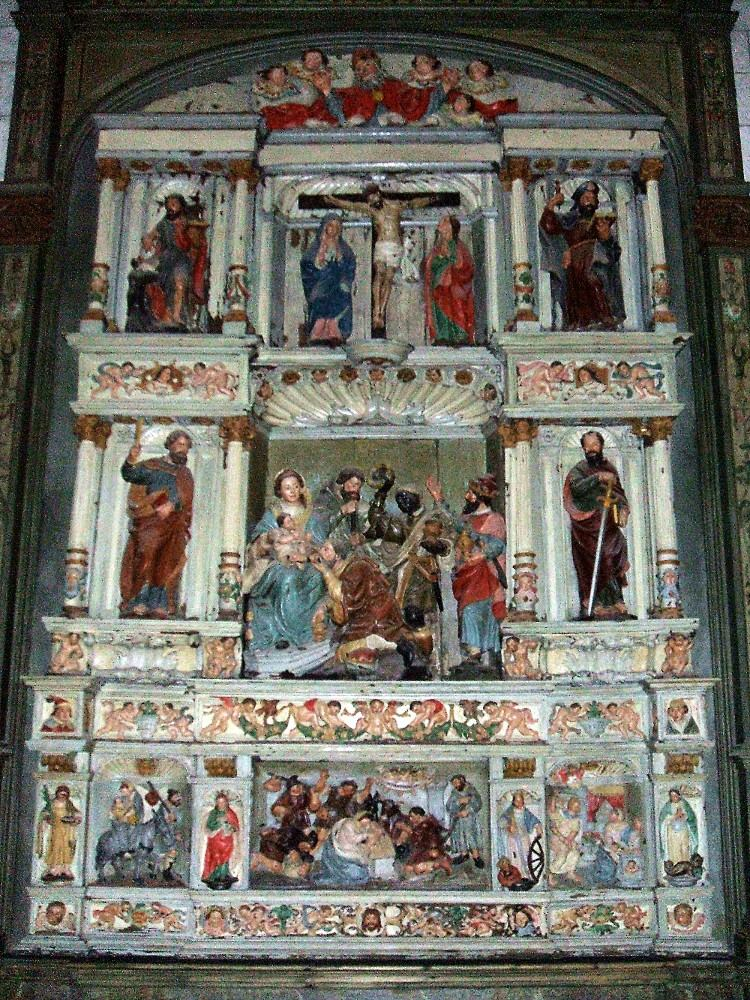 Retablo de los Reyes, Iglesia de San Pedro Apóstol, Vitoria-Gasteiz